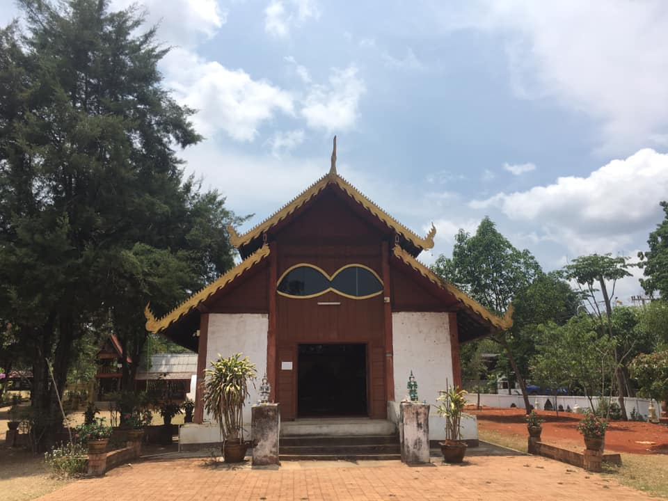 วิหารแว่นตาดำ